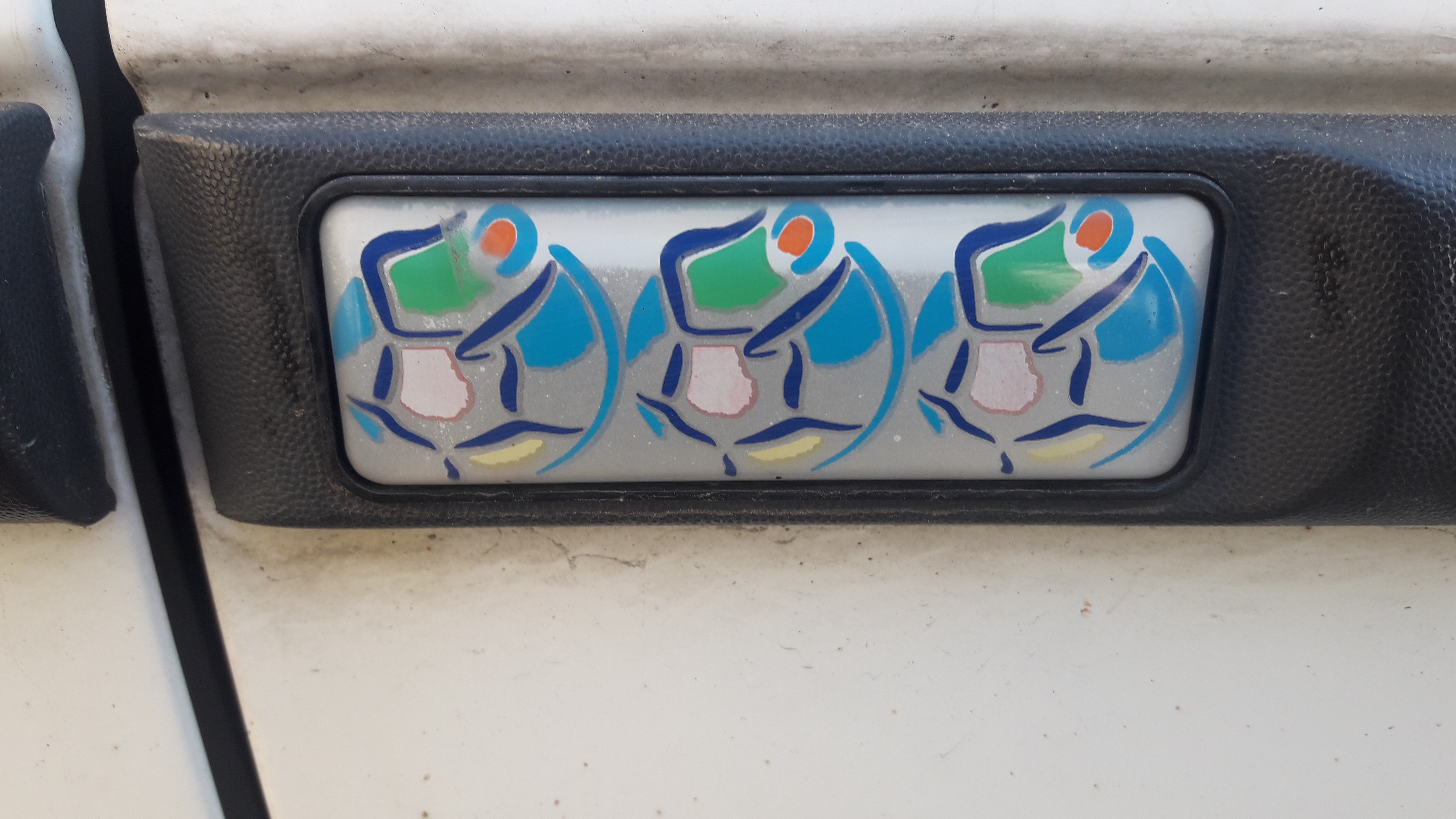 samsung 20180420 153432